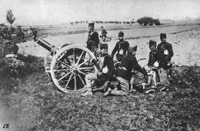 Artillerie austro-hongroise à l'entraînement in "The Illustrated London News" du 1er août 1914 (Vol CXLV Page 17)